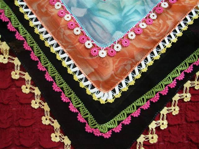 İğne Oyası ile yapımız yazma